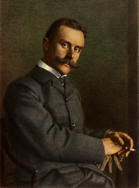 Stahlstich, koloriert, (1904) von Johann Lindner [1839 - 1906] Herkunft (Allgemein): Herstellungsort: München Person: Thomas Mann [1875 - 1955], Deutscher Schriftsteller